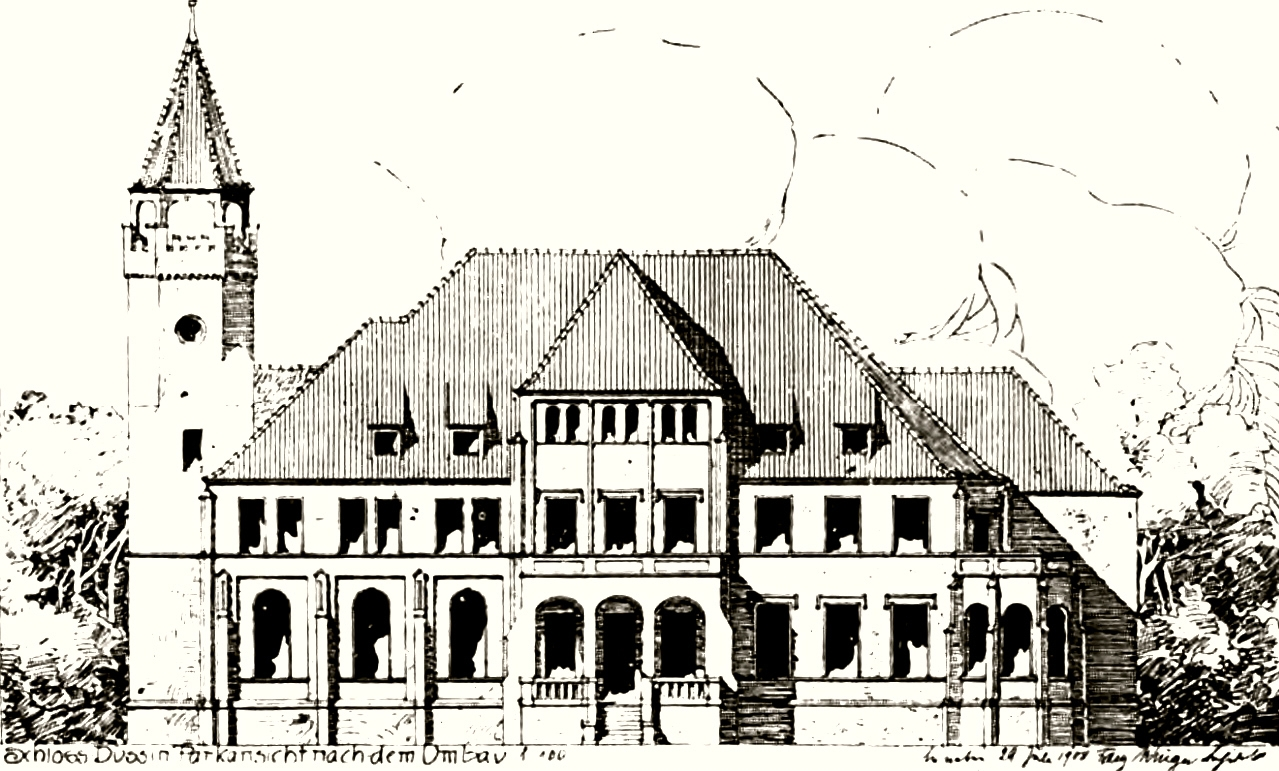 Entwurfszeichnung Herrenhaus Düssin, Parkseite.